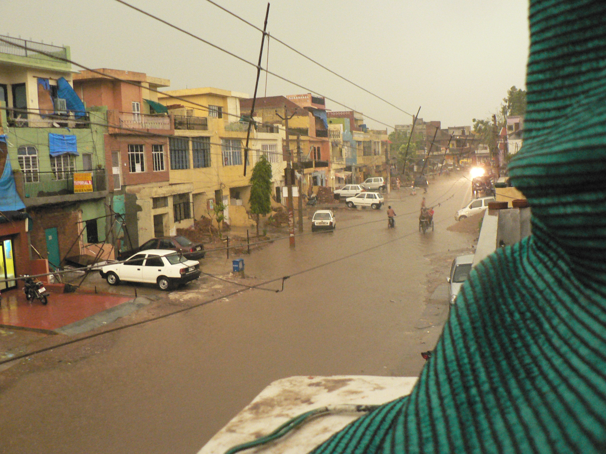 1.2 only